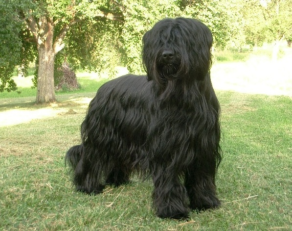 Briard weiblich noir